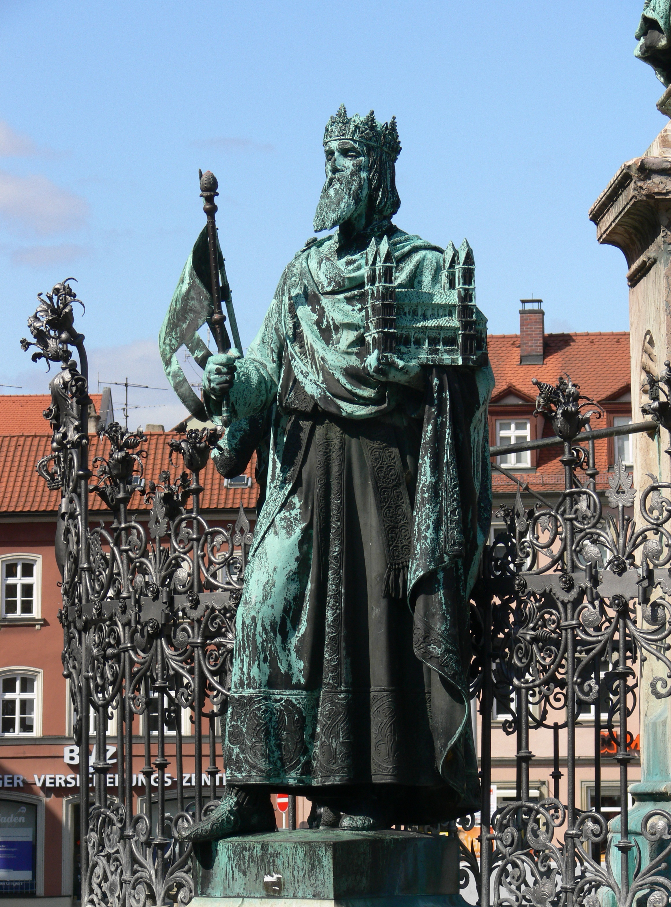 Bamberg, Maximiliansbrunnen am Maximiliansplatz, Detail: Kaiser Heinrich II.